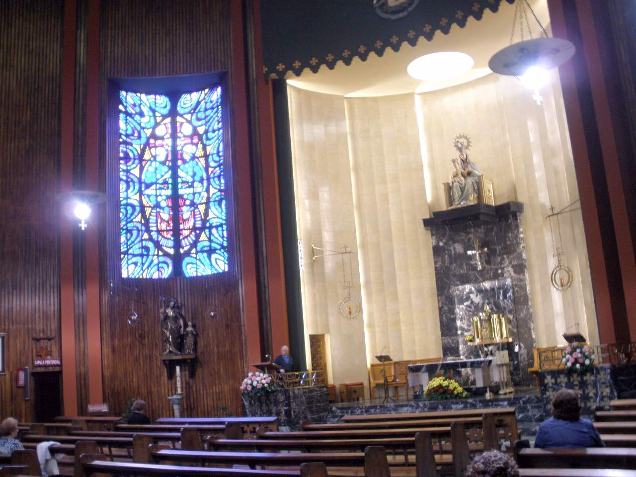 Iglesia del Inmaculado Corazón de María, en Oviedo